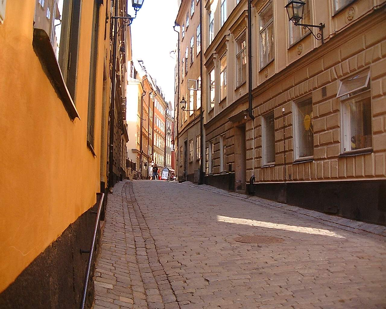 Skomakargatan, Gamla stan, Stockholm.